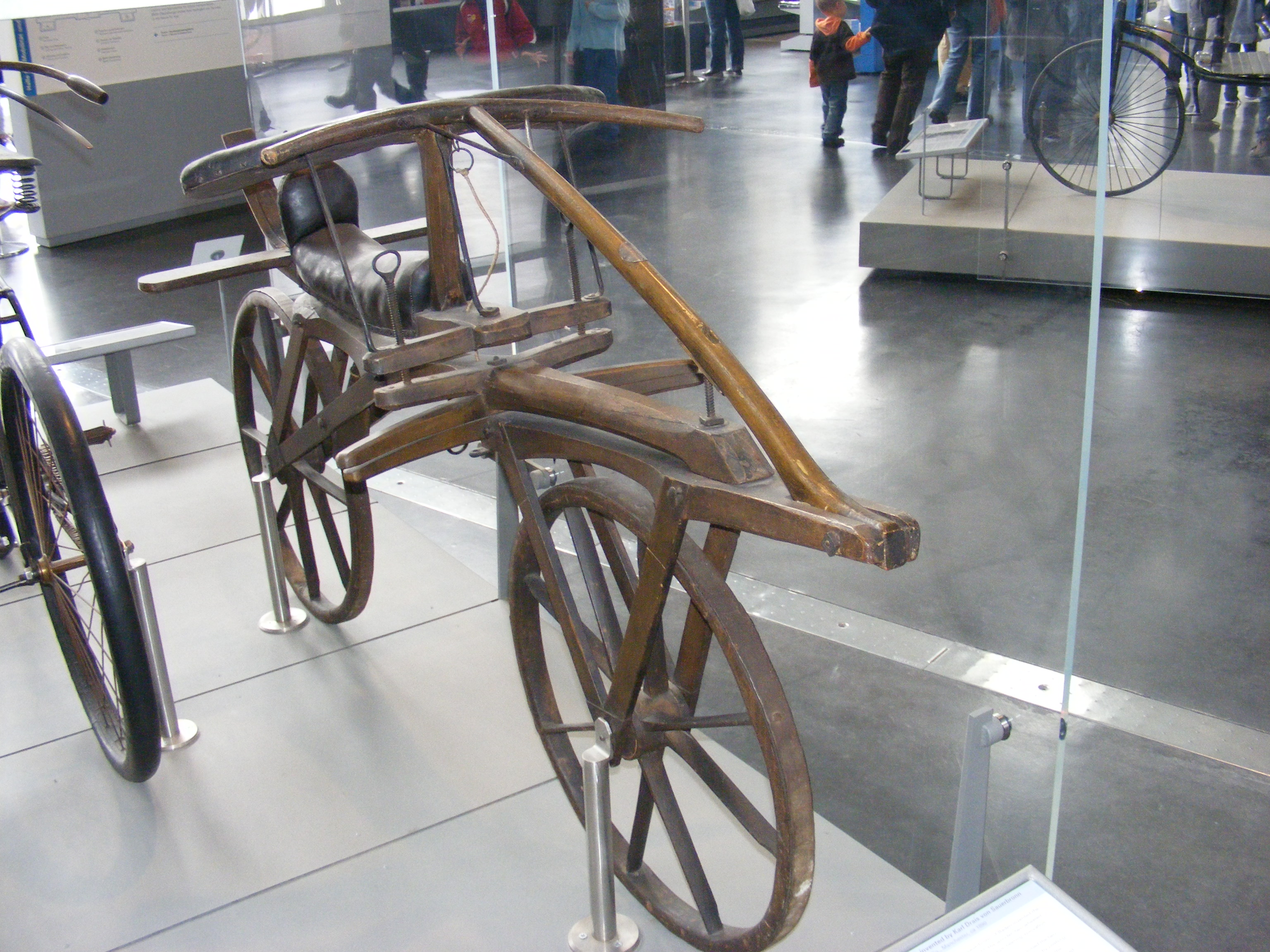 Laufmaschine des Karl Friedrich Drais 1817, gefertigt durch Johann Frey, Stellmacher in Mannheim (Gewicht 18 kg, Länge 196 cm, Höhe 108 cm) — Exponat im Deutschen Museum Verkehrszentrum (München)